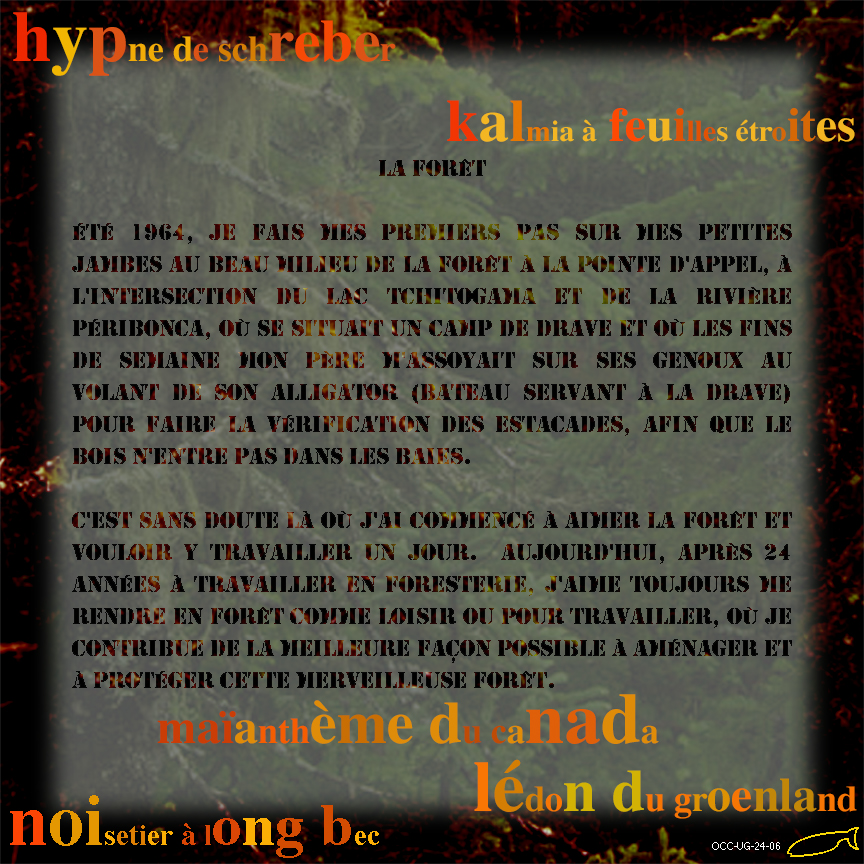 Une des 149 bannières réalisées dans le cadre de l'Action performative « L'Arbre, ce livre ». Le texte est une création d'un des employés de Forêt Québec 02 en 2005.